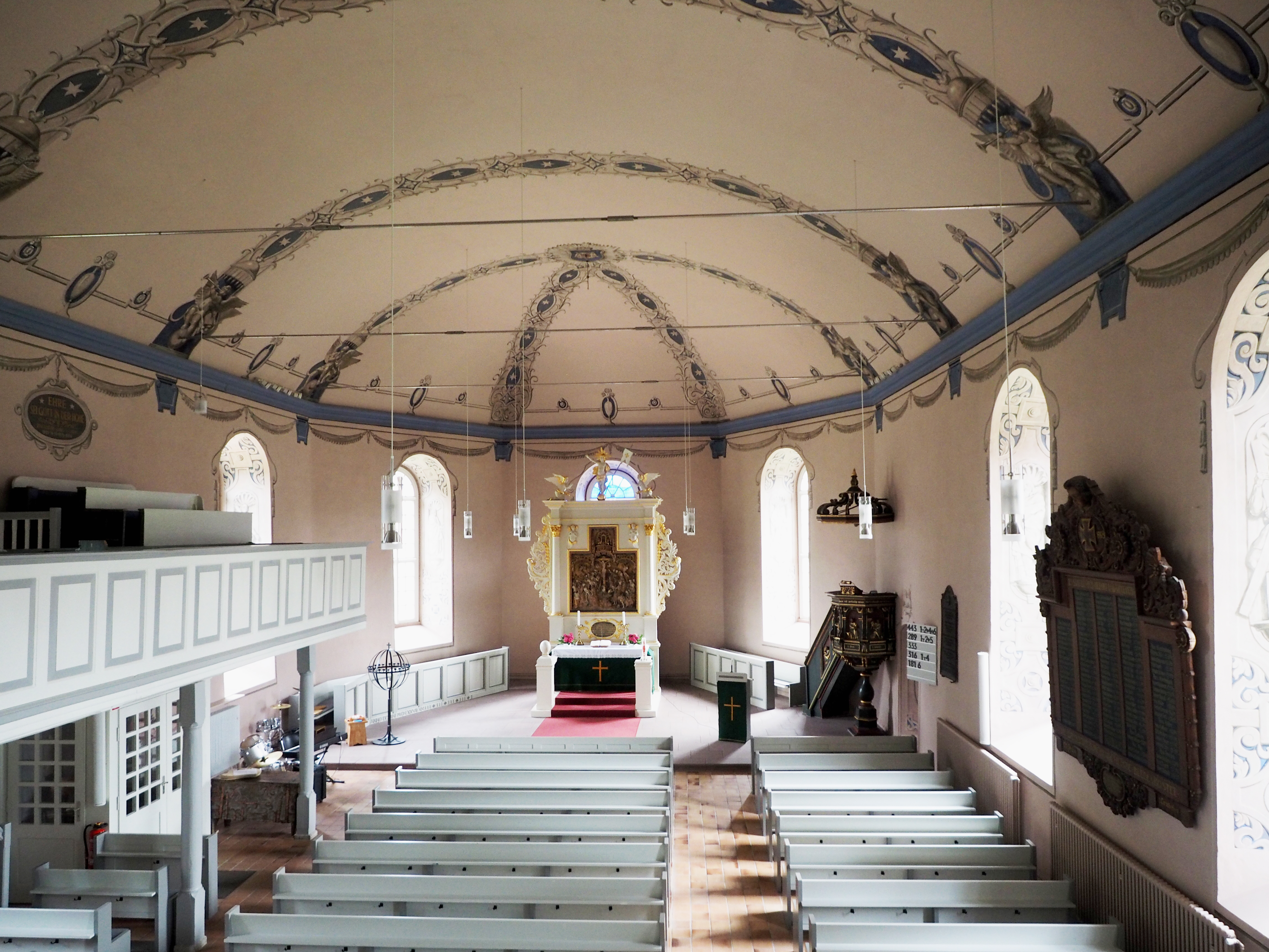 Innenraum mit Altar, Kanzel und Emporen in der Martinskirche in Beedenbostel, Niedersachsen